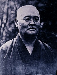 田山花袋(Tayama Katai,1872-1930)